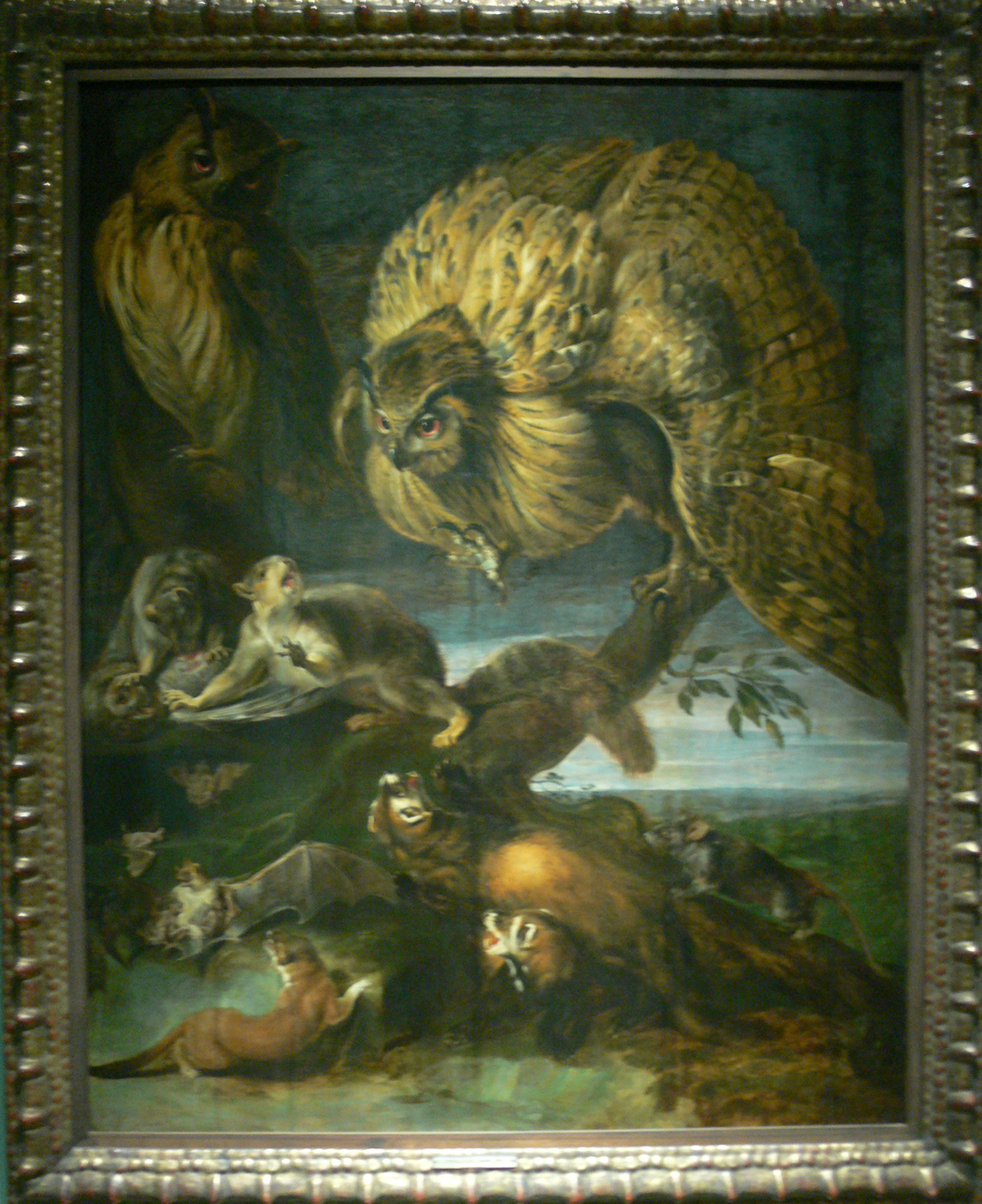 Frans Snyders - Animaux de la nuit (copie) - huile sur toile. Düsseldorf, Museum kunst palast, M 180